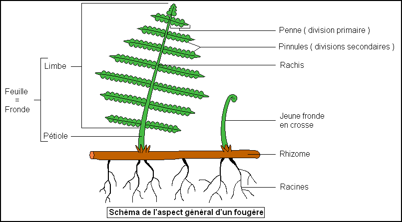 Organisation générale d'une fougère type (Polypodiales).